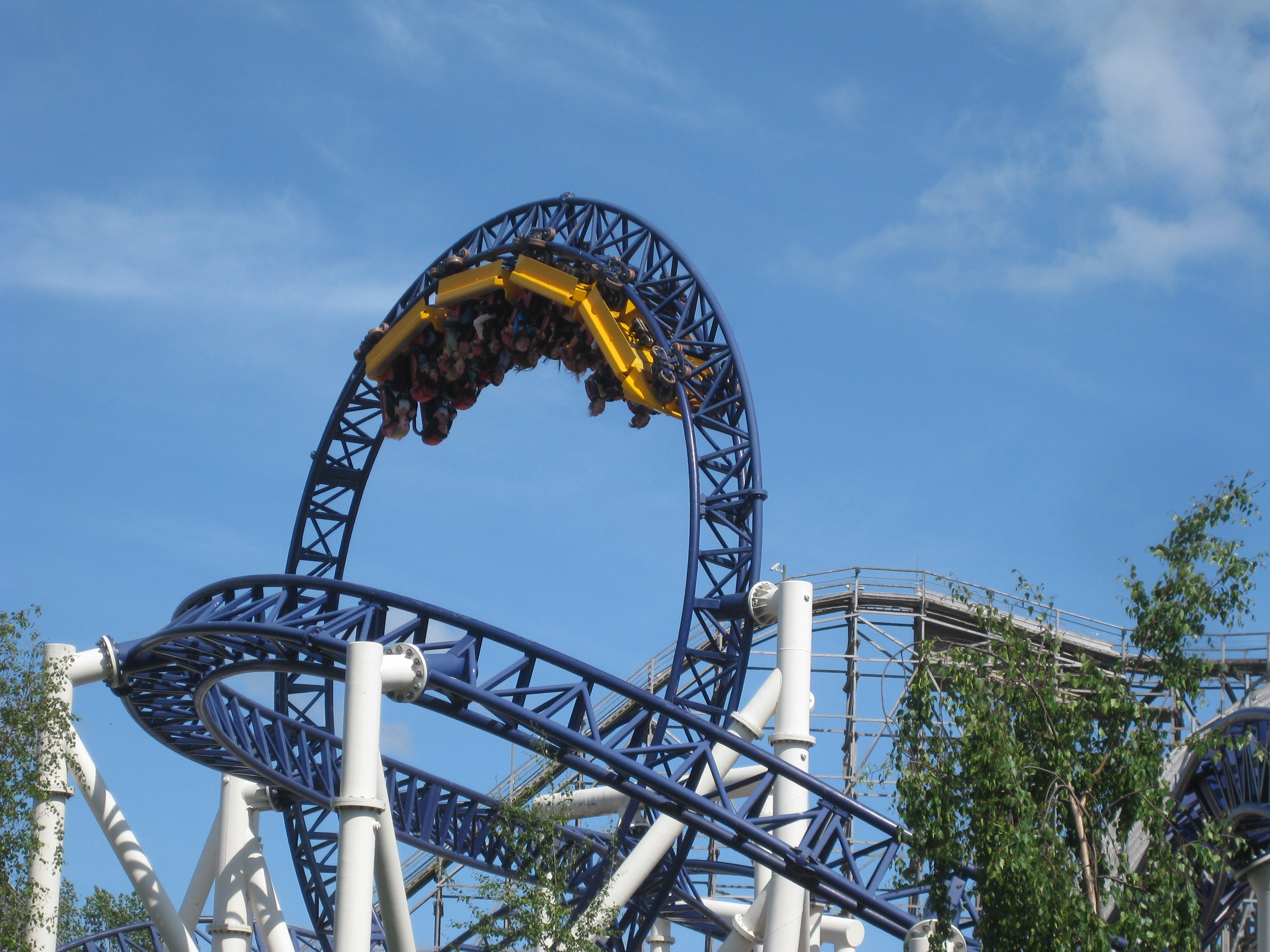 Berg- och dalbanan "Kanonen", på Liseberg, Göteborg.